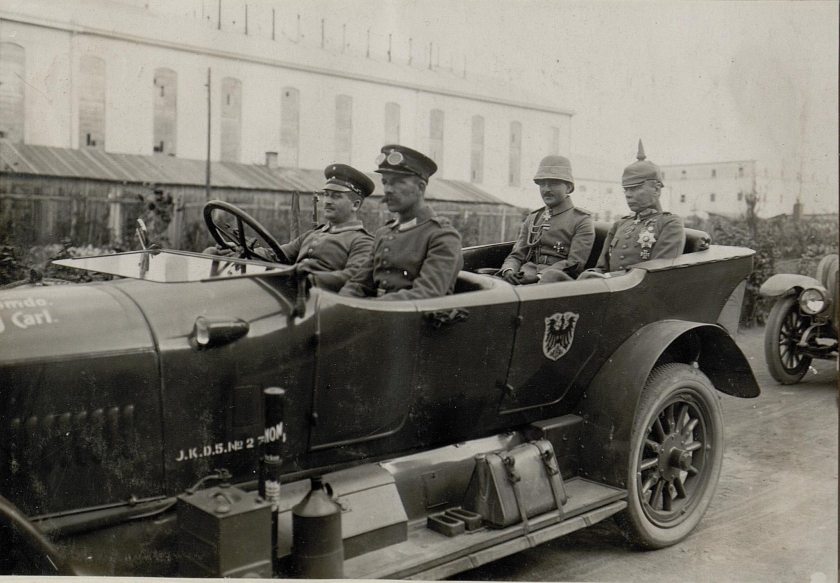 Erzherzog Karl war von Juni 1916 an, Oberkommandierender eines Teilabschnittes der Ostfront und befehligte mehrere Armeen zwischen Brody und den Karpaten. Im Rahmen dieses Kommandos inspizierte Erzherzog Karl seine ihm zugeordneten Einheiten.